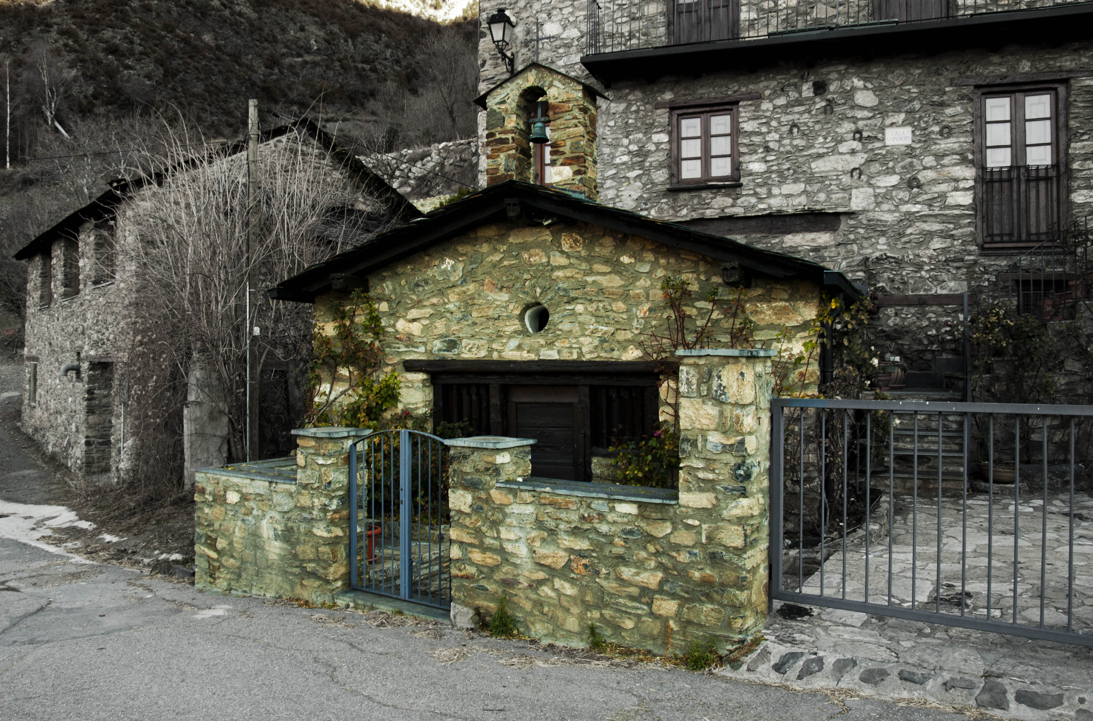 La Capella de la Mare de Déu de les Neus - Llumeneres - Sant Julià de Lòria.